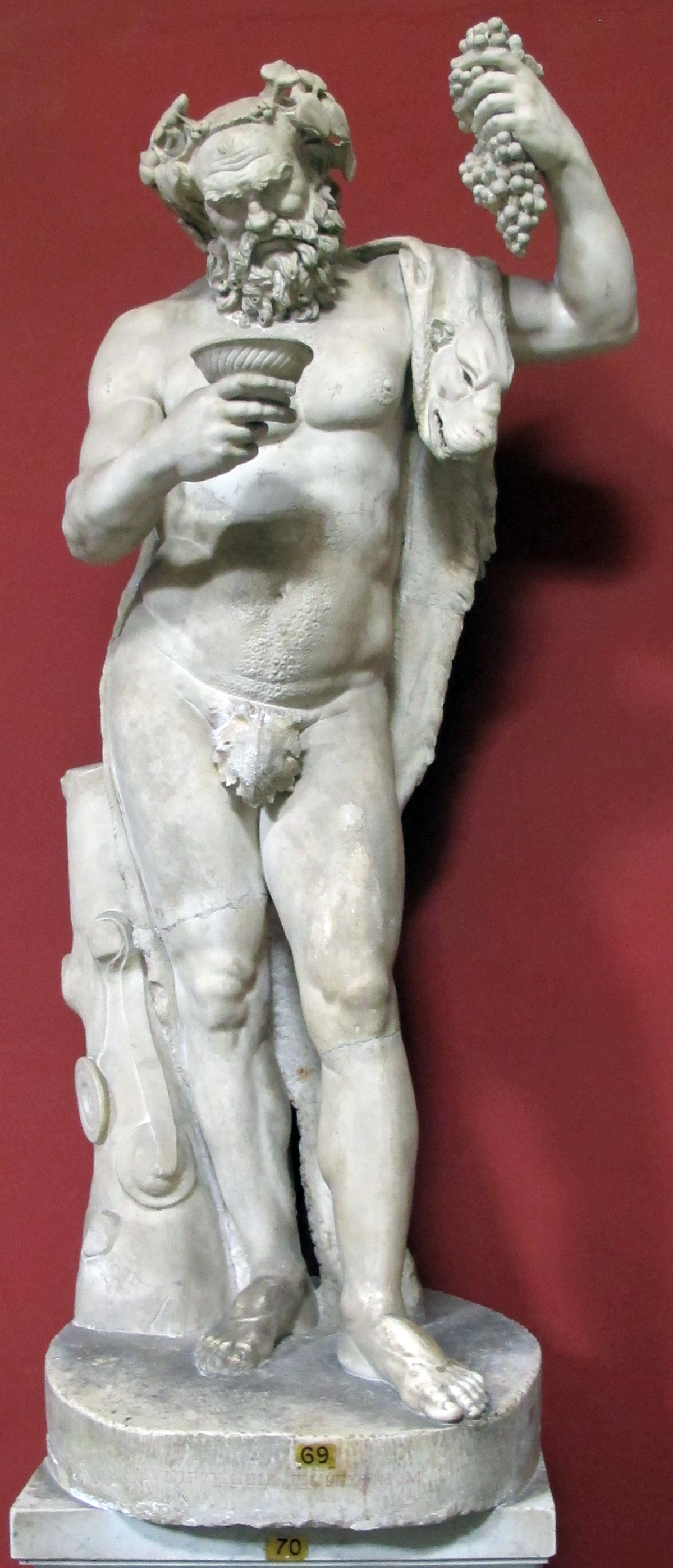 Arte romana nei Musei Vaticani